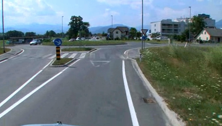 Krožišče v Lescah na Gorenjskem urejeno ob gradnji AC